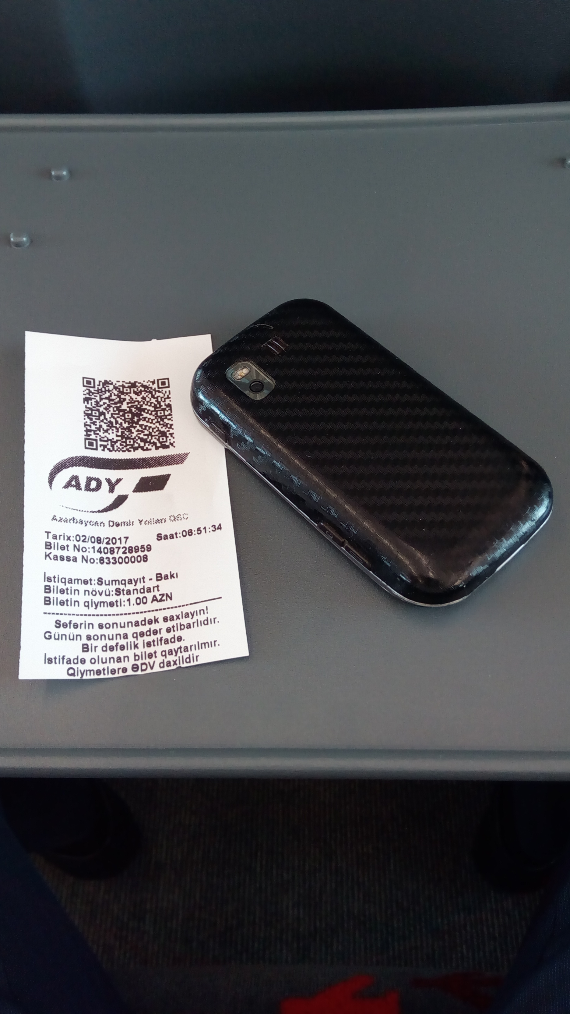 Bakı 2017